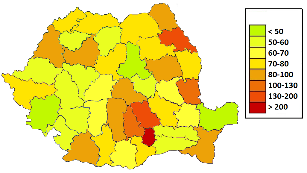 Плотность населения Румынии по жудецам